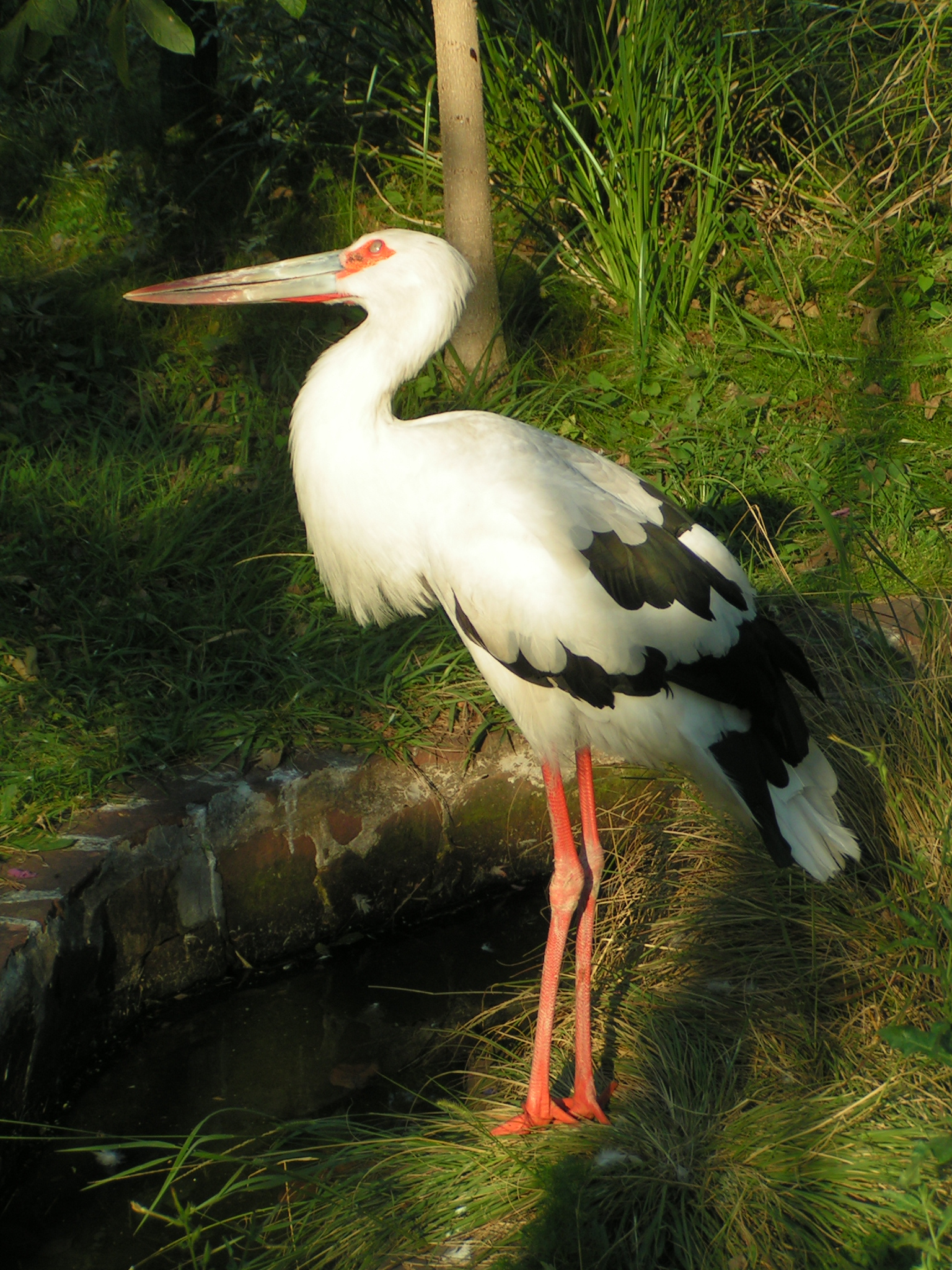 Tuyango, cigüeña americana o tabuyayá (Ciconia maguari)